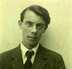 André Jean Eugène Prudhommeaux, né le 15 octobre 1902 au Familistère de Guise (Aisne) et mort le mort le 13 novembre 1968 à Versailles en France) est un poète, écrivain et traducteur. Militant communiste conseilliste puis libertaire.